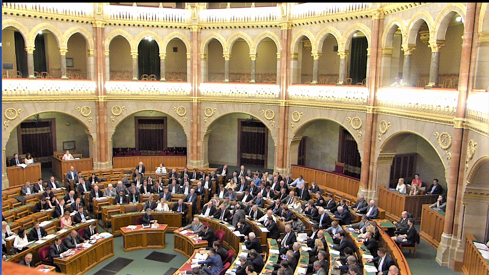 Szavazás a Stop Soros törvénycsomag összegző módosítás minősített többséget igénylő 2. pontjáról 2018. június 20-án.